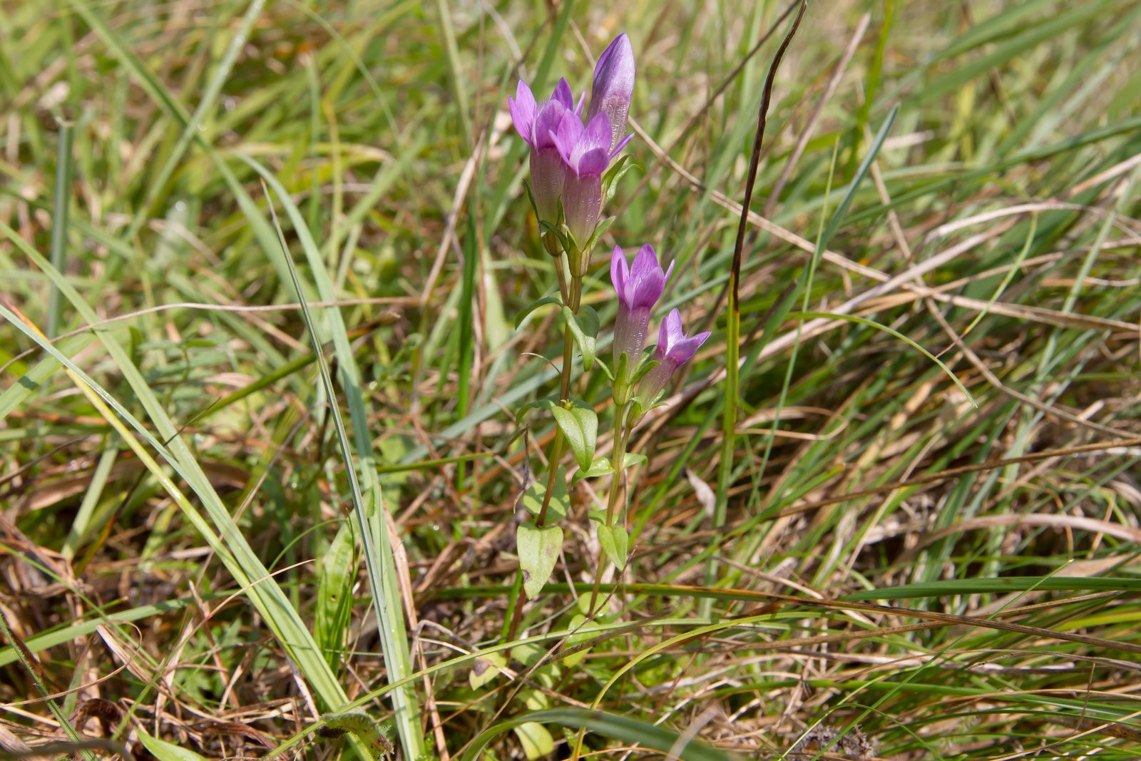 Deutscher Enzian (Gentianella germanica) im Naturschutzgebiet Kalkmagerrasen bei Rüthen-Meiste.